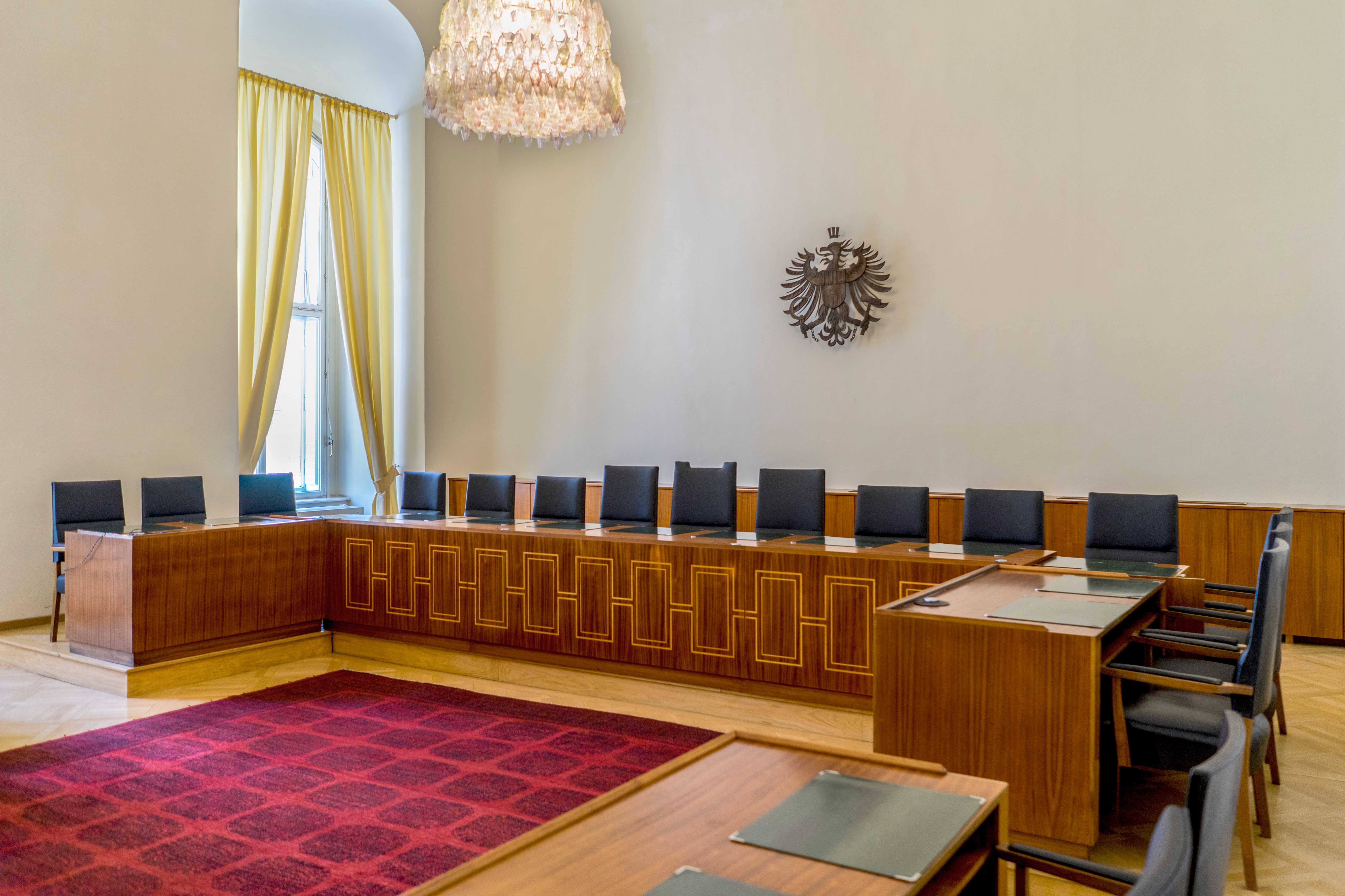 Ehem. Böhmische Hofkanzlei, jetzt Verwaltungsgerichtshof. Verhandlungssaal. Innenarchitektur Erich Boltenstern (1946/1947)